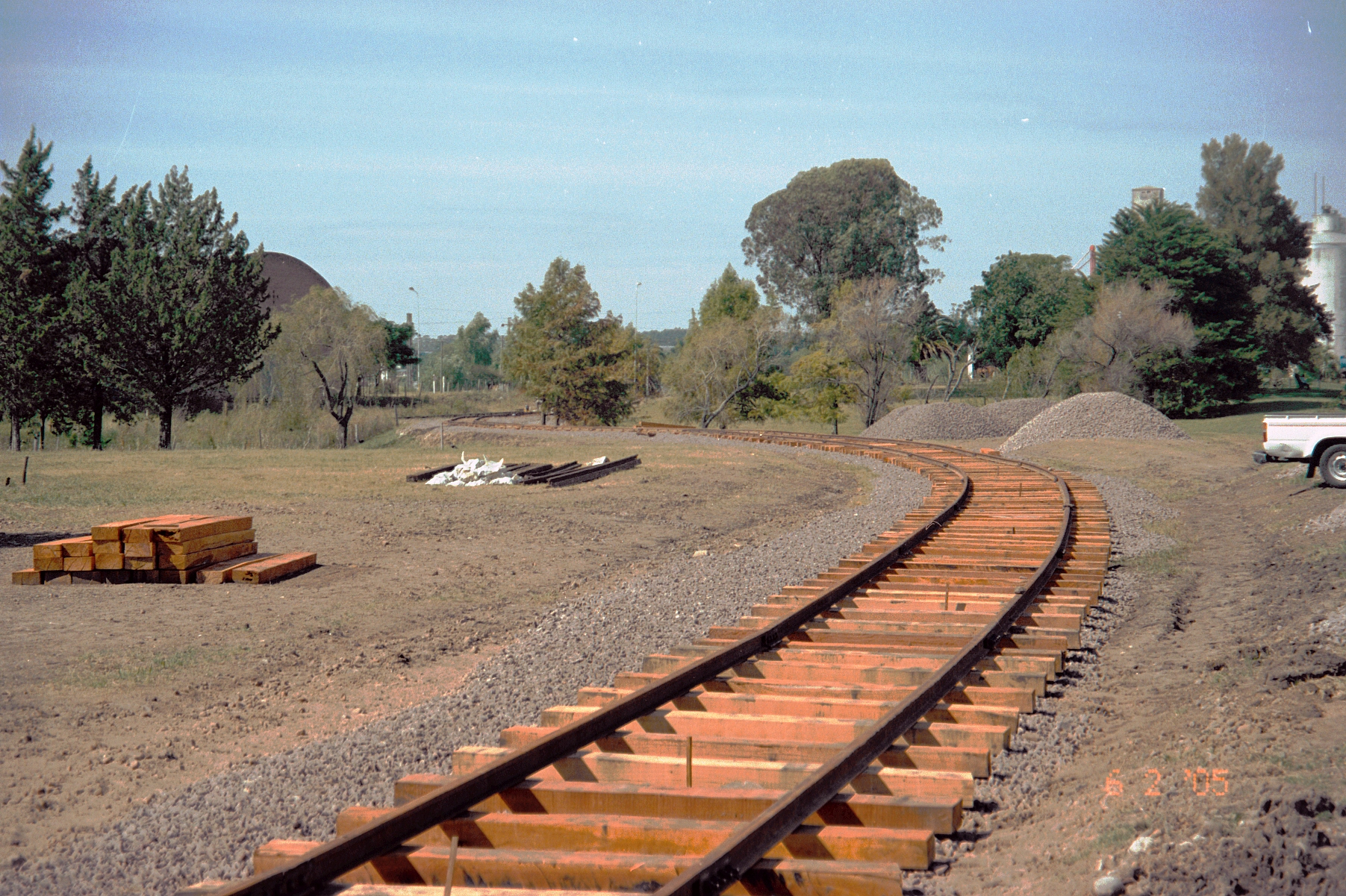 Vía sobre durmientes de madera de eucalipto, Tacuarembó, Uruguay. Foto tomada durante la construcción de un desvío secundario para carga de arroz.